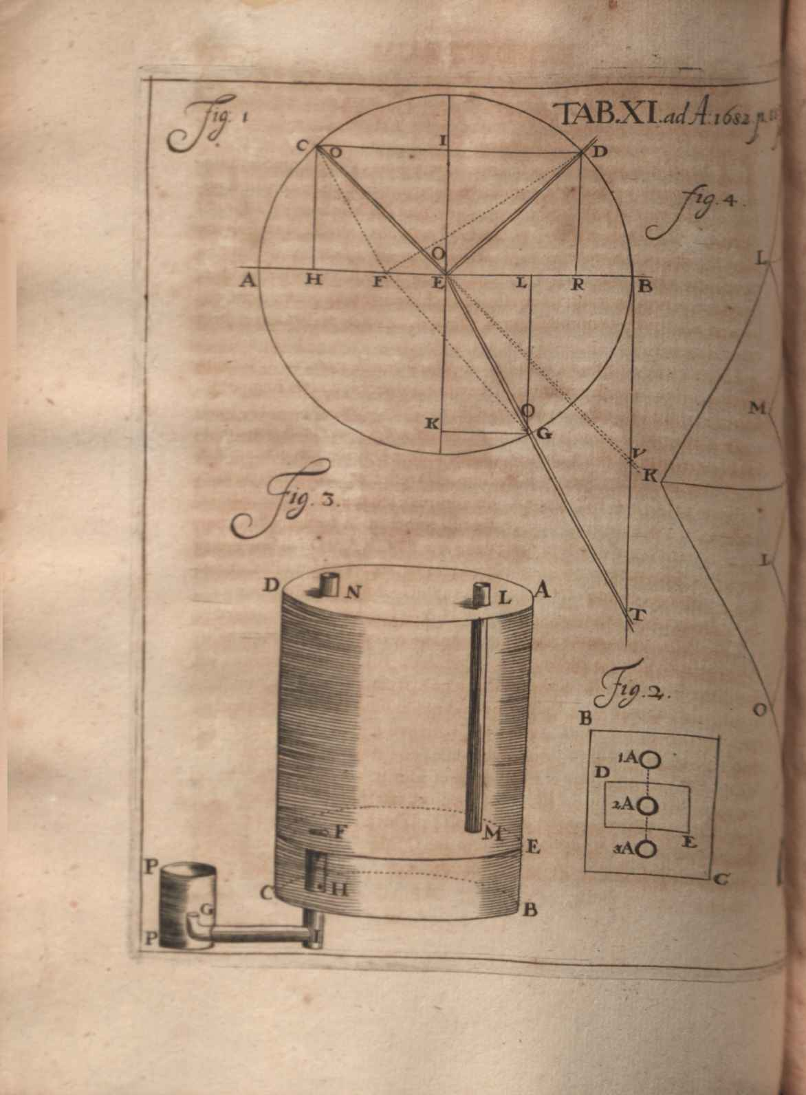 Illustration